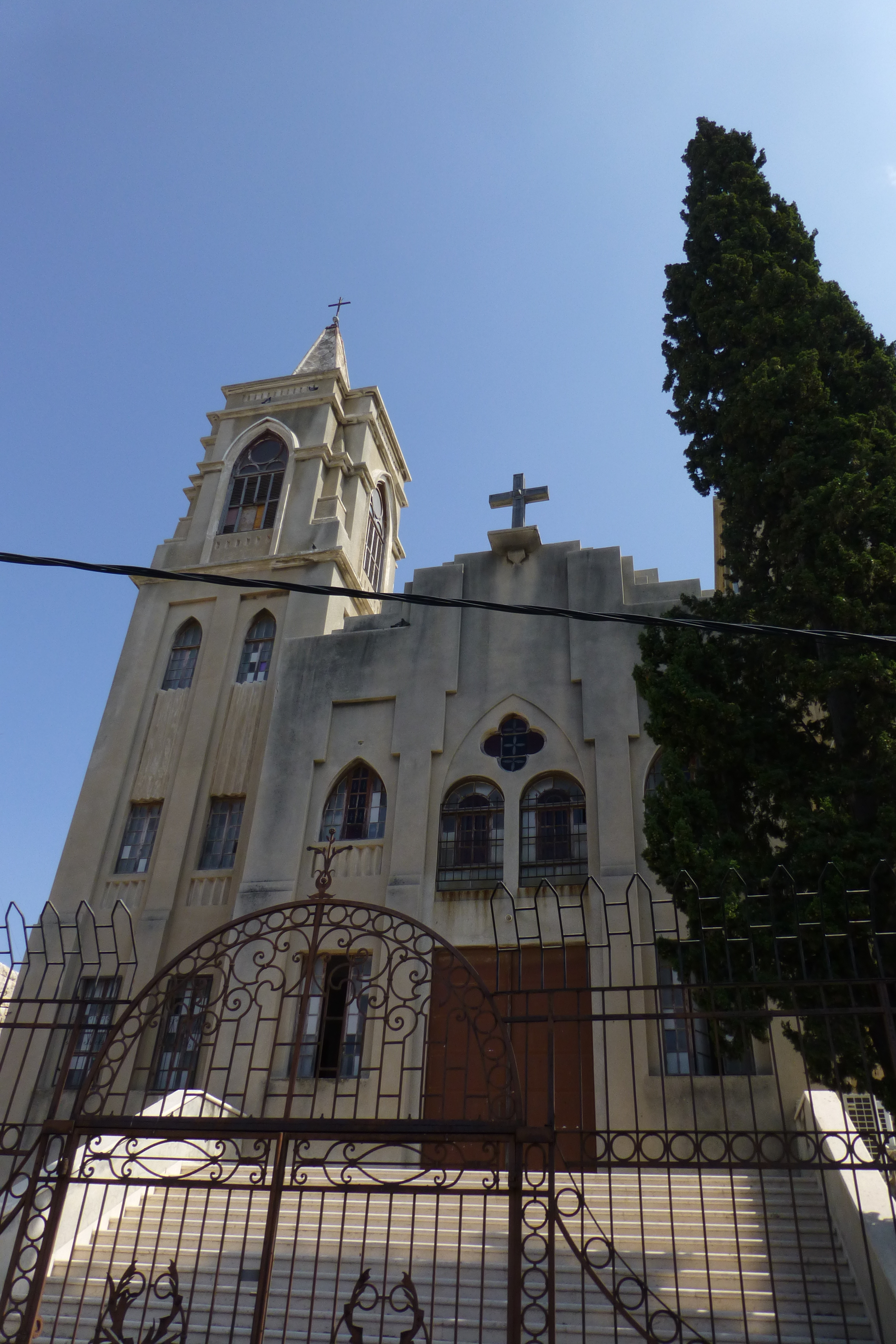 כנסיית יוחנן הקדוש היא כנסייה אנגליקנית השוכנת בואדי ניסנאס ברחוב יוחנן הקדוש פינת רחוב חורי בעיר התחתית שבחיפה. המבנה הוקם בשנת 1935 בסגנון התחייה הגותית.